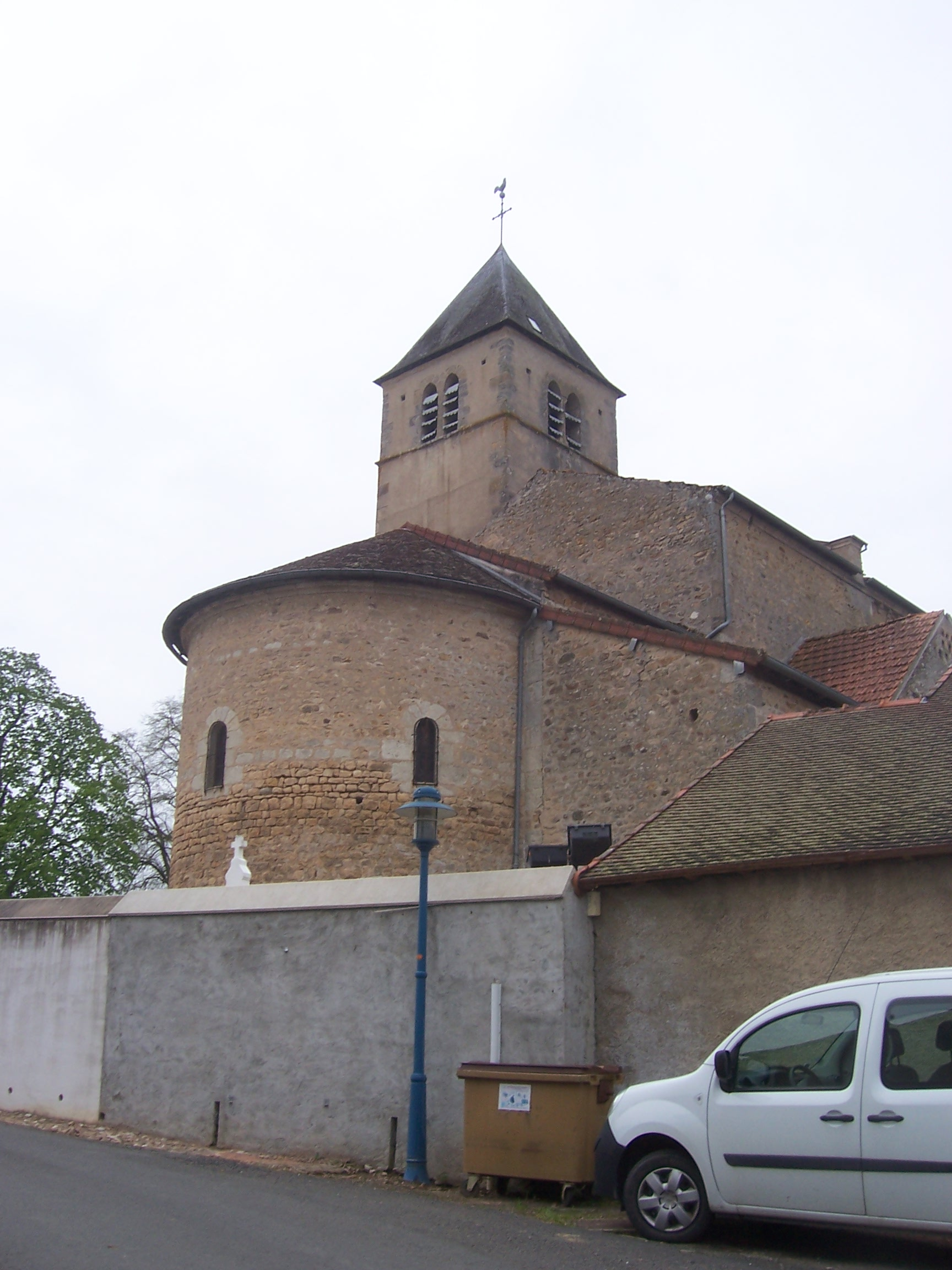 Eglise de Cressy-sur-Somme